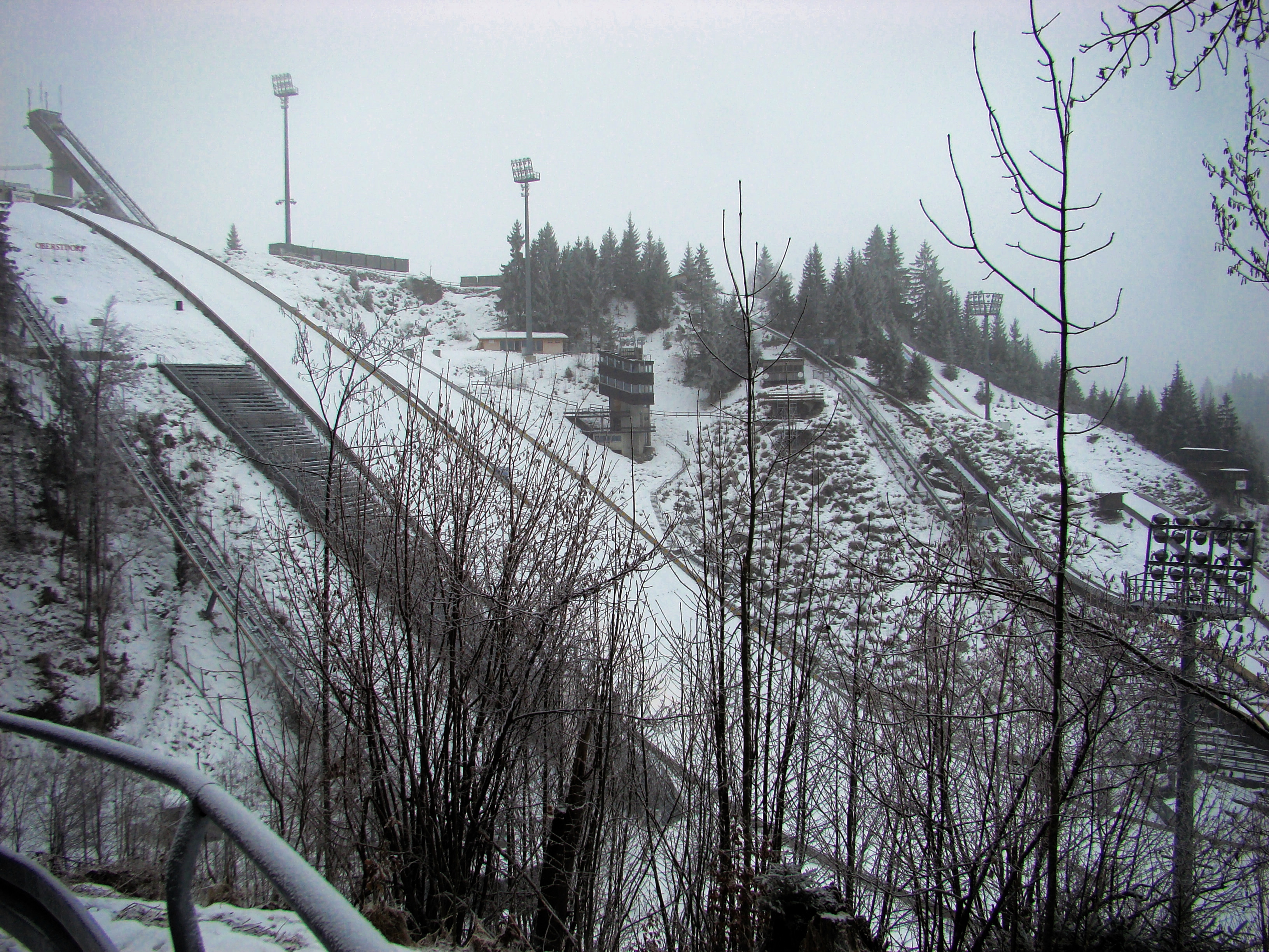 Die Skisprungschanzen in Oberstdorf. Im Vordergrund die Schattenbergschanze, als größte und Hauptschanze.